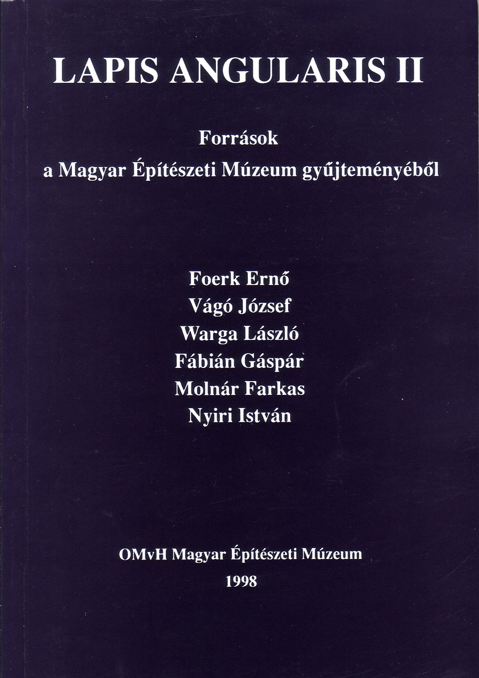 Lapis Angularis II című MÉM-könyv borítója